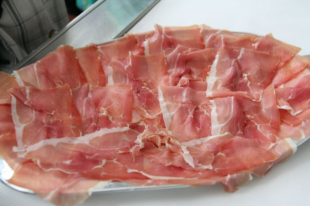 Prosciutto di Parma affettato 生ハムを一皿食べてしまいました。